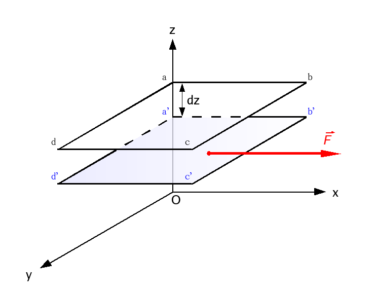 Schéma illustrant la définition de la viscosité dynamique d'un fluide.